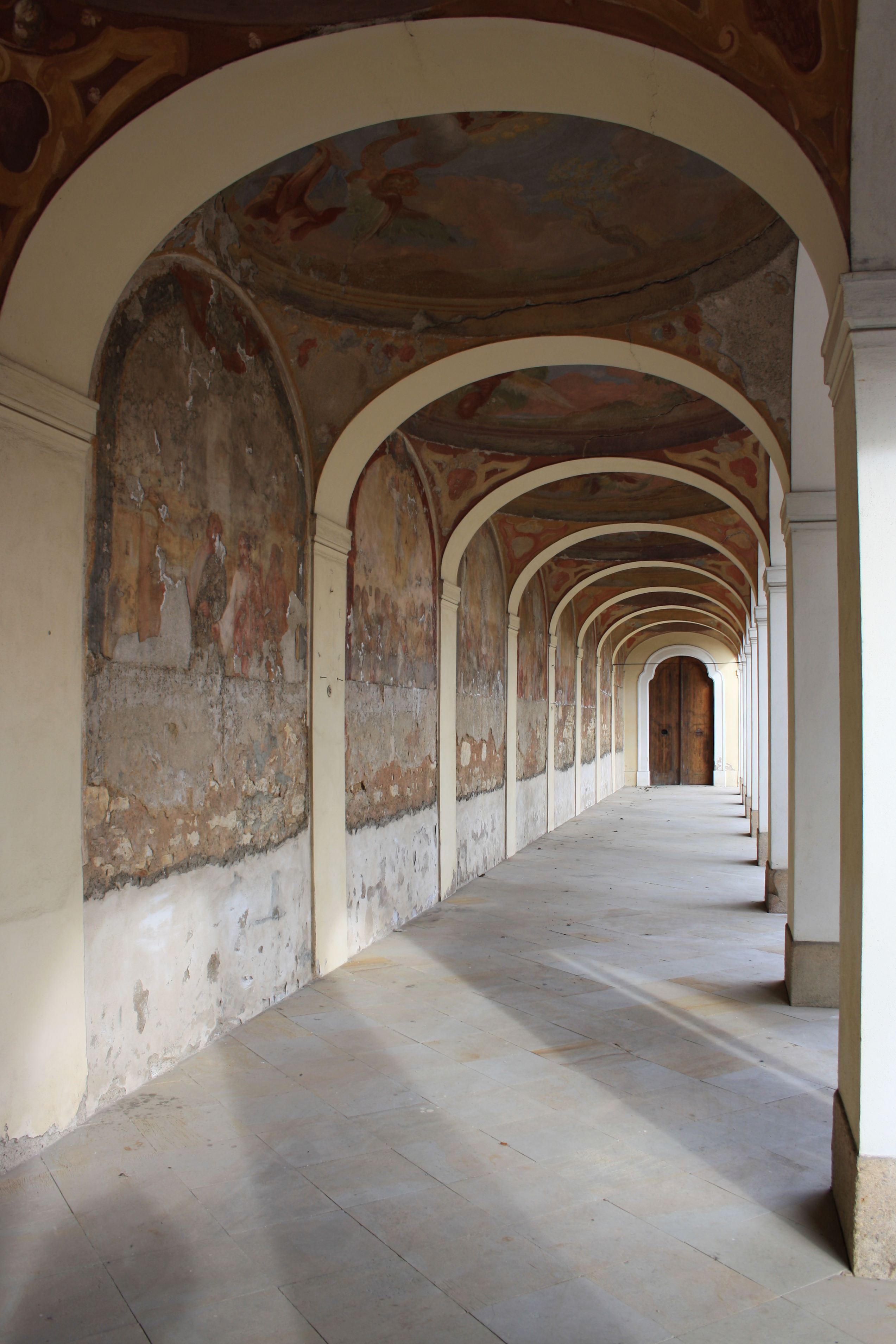 Praha, Bílá Hora - Kostel Panny Marie Vítězné